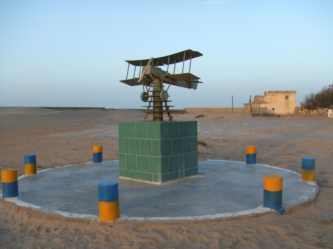 Exterior del Museo Antoine de Saint-Exupéry en Tarfaya (Marruecos)